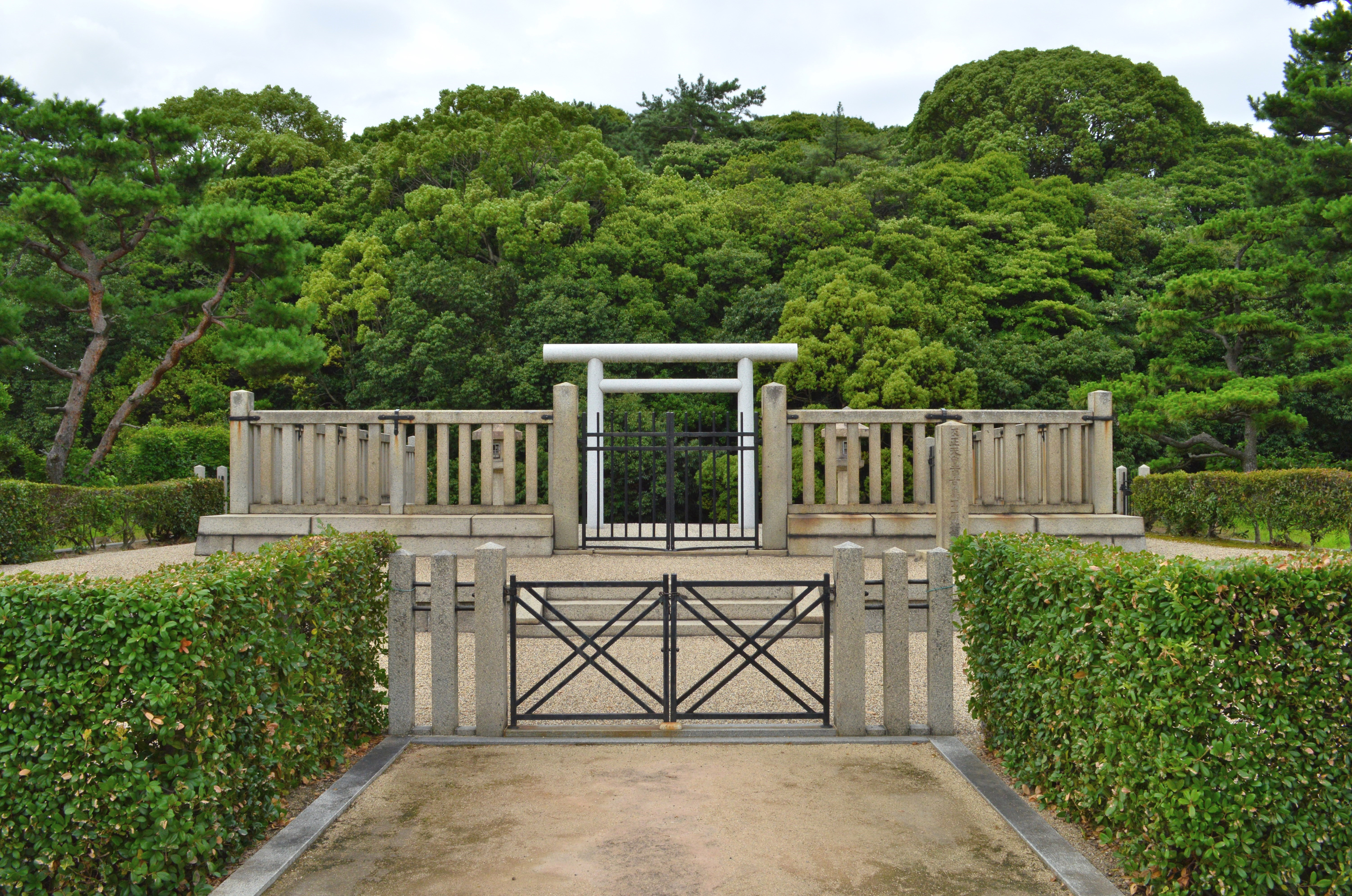 田出井山古墳 反正天皇百舌鳥耳原北陵拝所